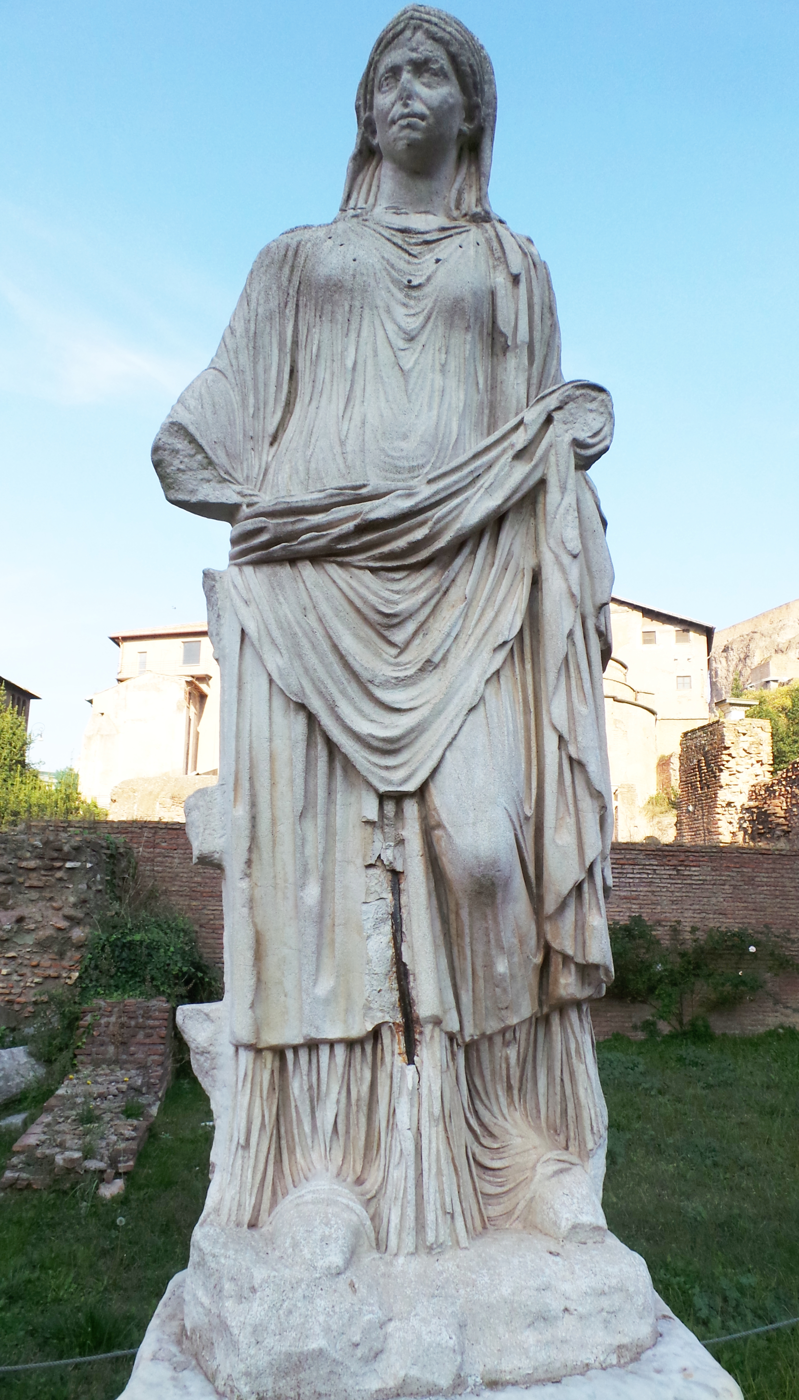 Statue einer römischen Vestalin innerhalb des Atrium Vestae